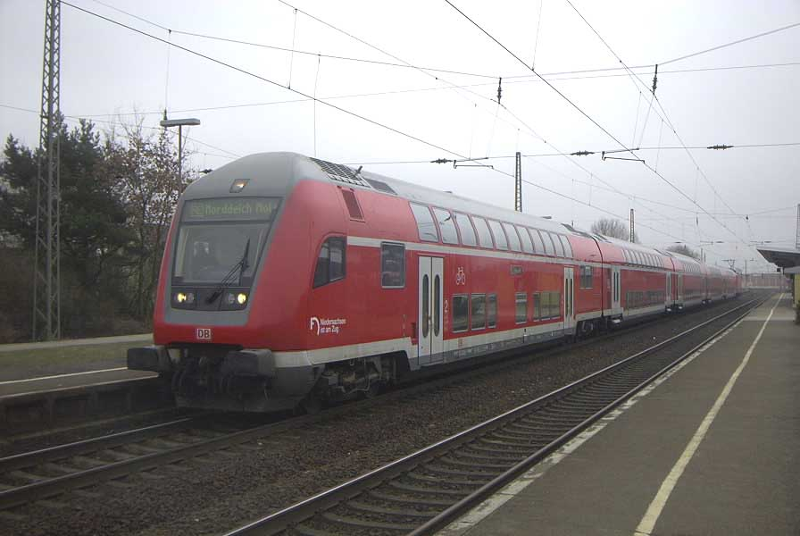 DB Steuerwagen an der Spitze eines RegionalExpress in Richtung Norddeich Mole im Bahnhof von Nienburg/Weser. Foto: Christian Immler 15. März 2003